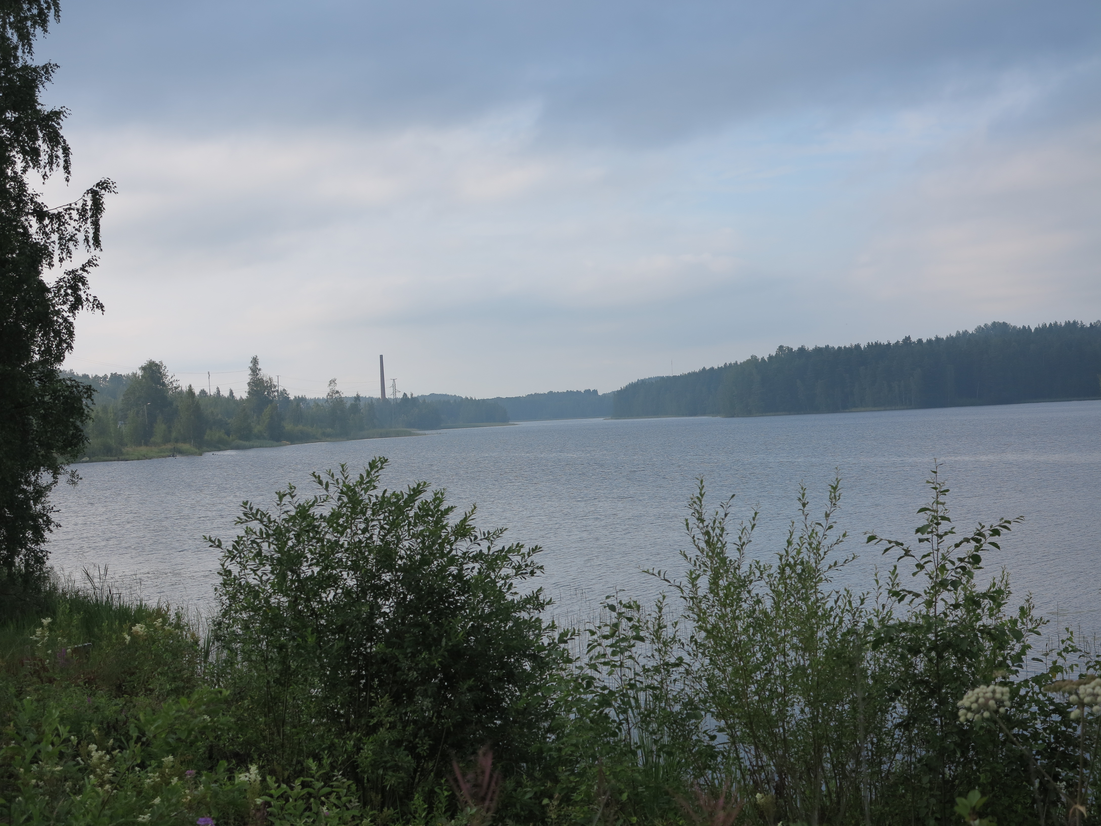 Maitiaislahti Heinolassa